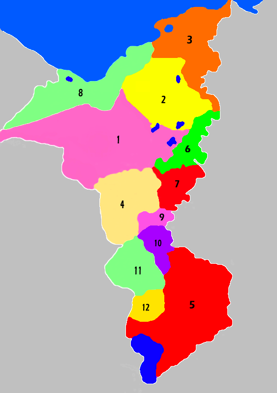 Mapa Politico del Departamento de Cortes, Honduras